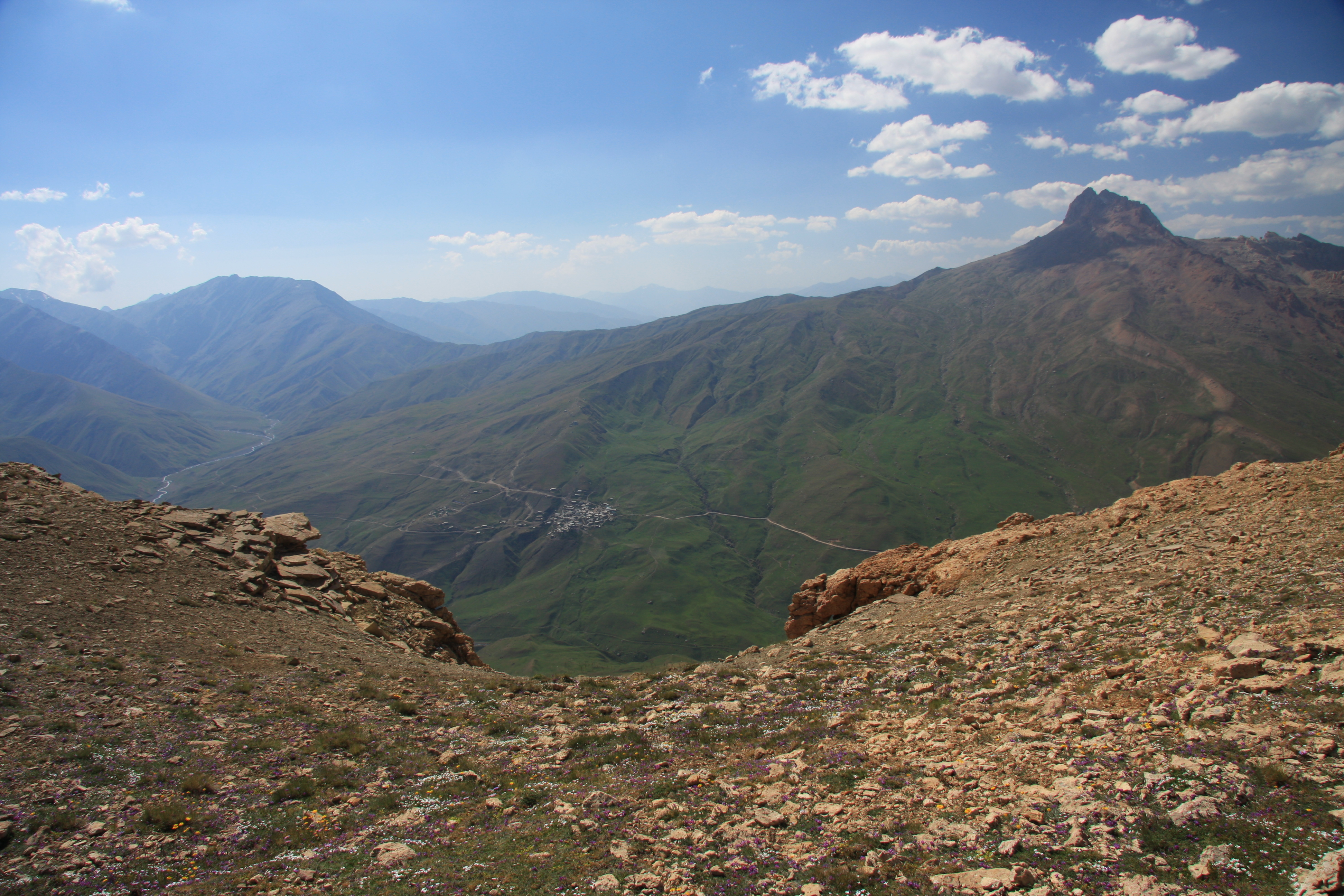 Вид на селение Куруш с вершины горы Ярудаг (Россия, Республика Дагестан, Докузпаринский район)